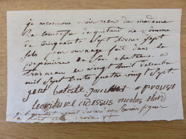 Quittance de la comtesse de Guitaut au château de Tresneau.(28) Gages du jardinier ( XVIIIe siècle)